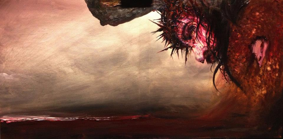 Krisztus (olajfestmény)